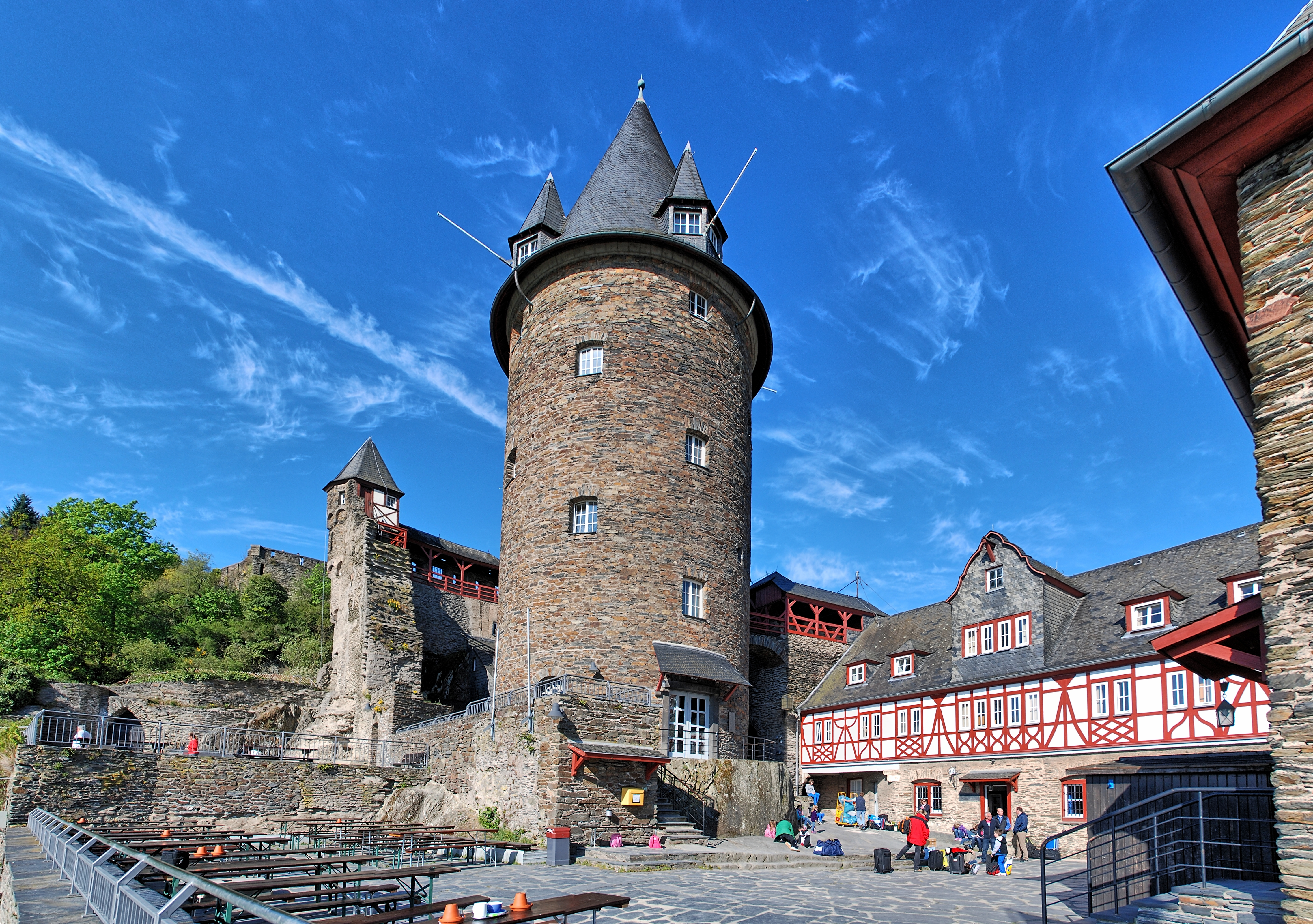 Burg Stahleck (Bacharach), Bergfried. [Panorama aus 3 Aufnahmen, gestichet mit Hugin. LDR-Verbesserung mittels easyHDR]